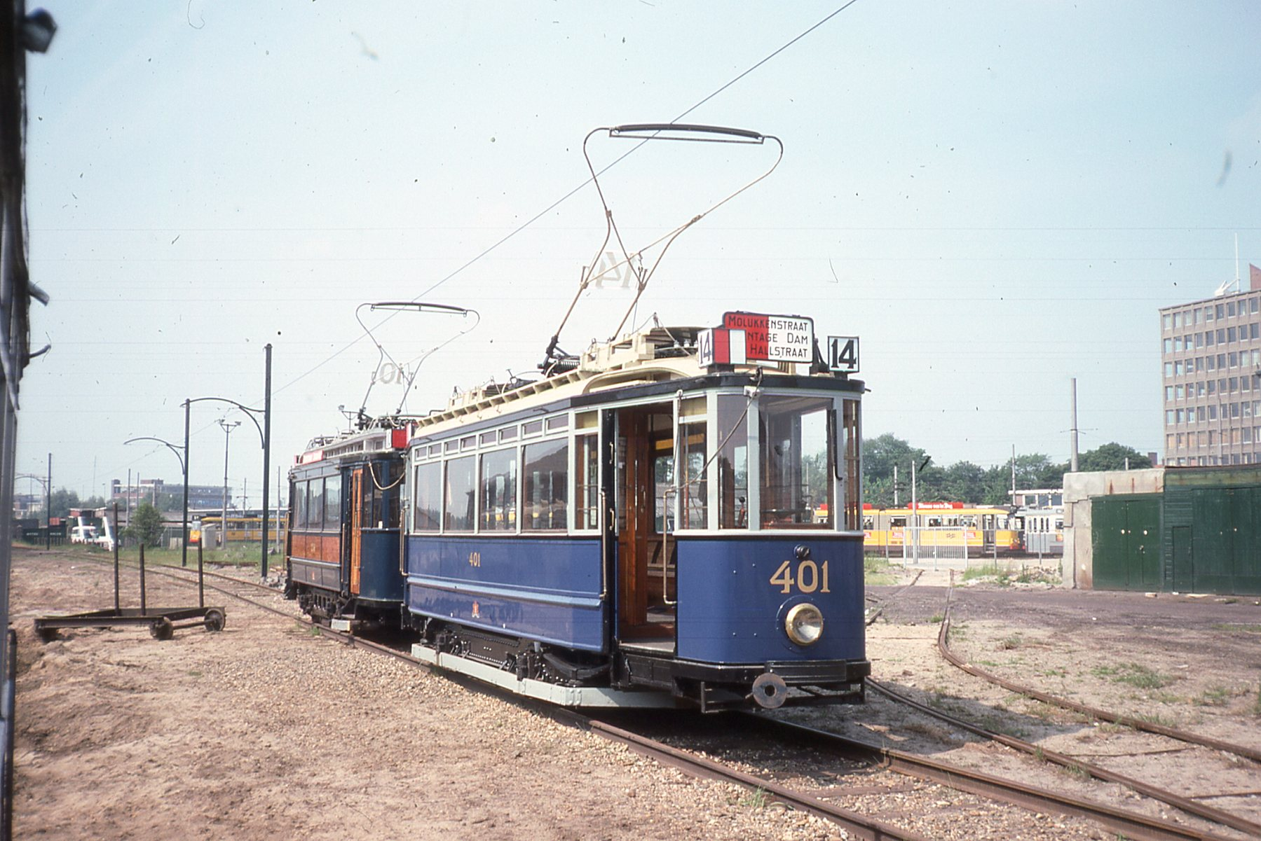 Photo: Trams aux Fils. En 1976, la liaison avec le réseau des trams de la ville passait par le dépôt des trams à cet endroit.